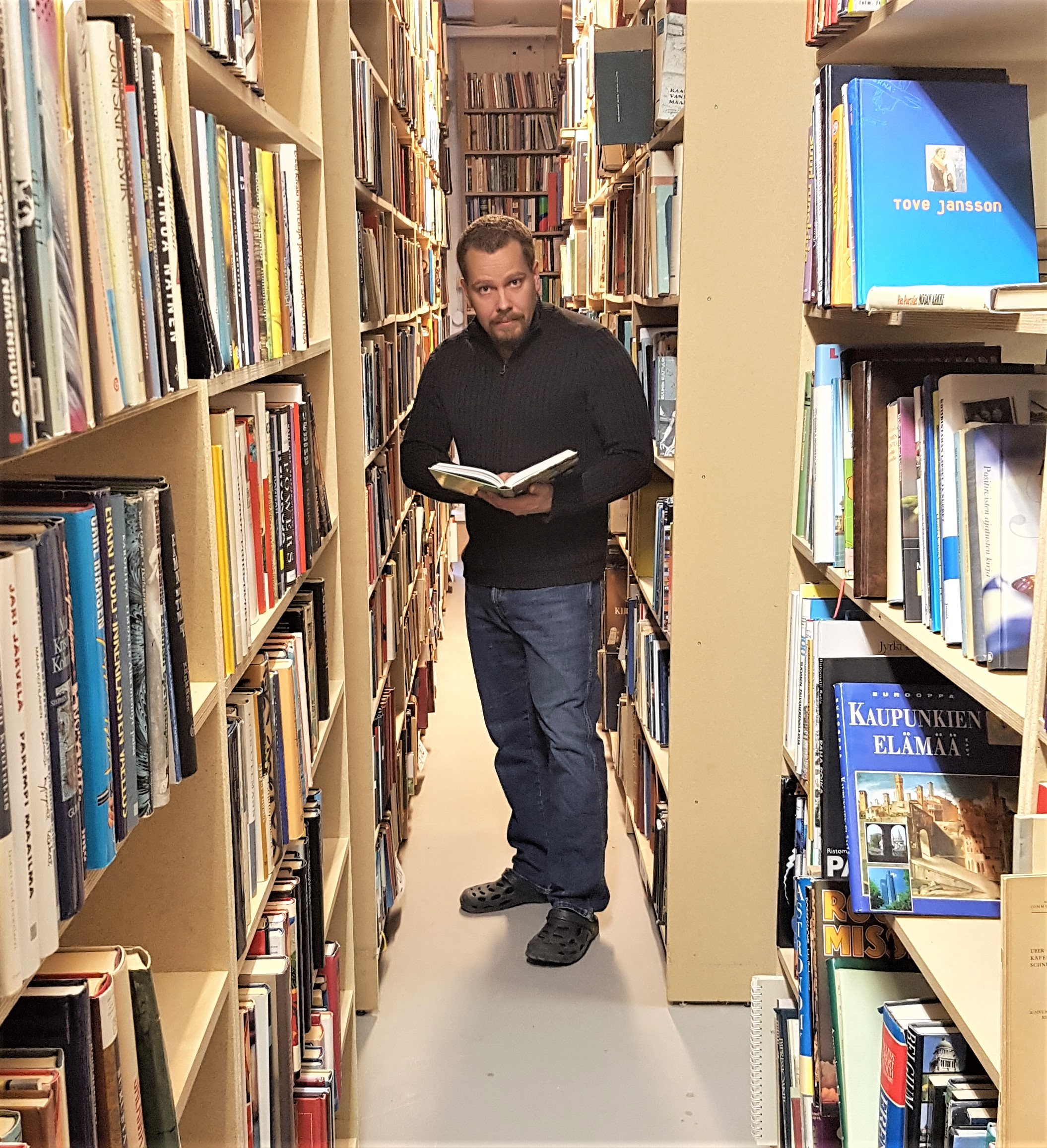 Antikvaari Matti Pietilä Finlandia Kirjan kirjahyllyjen keskellä